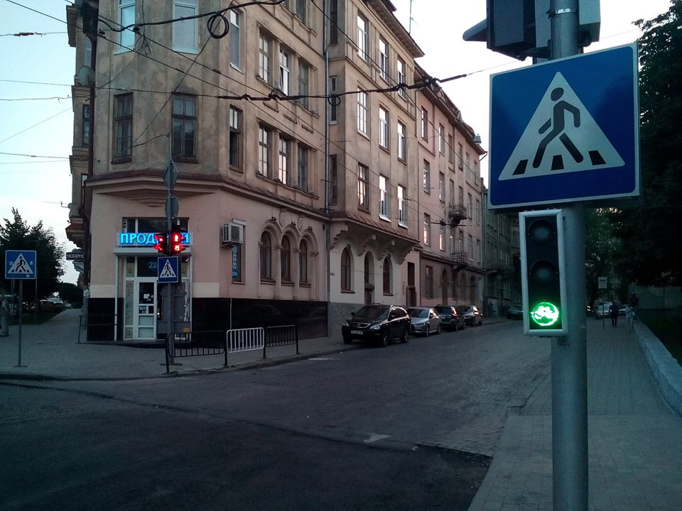 Bike traffic light in Lviv, Ukraine